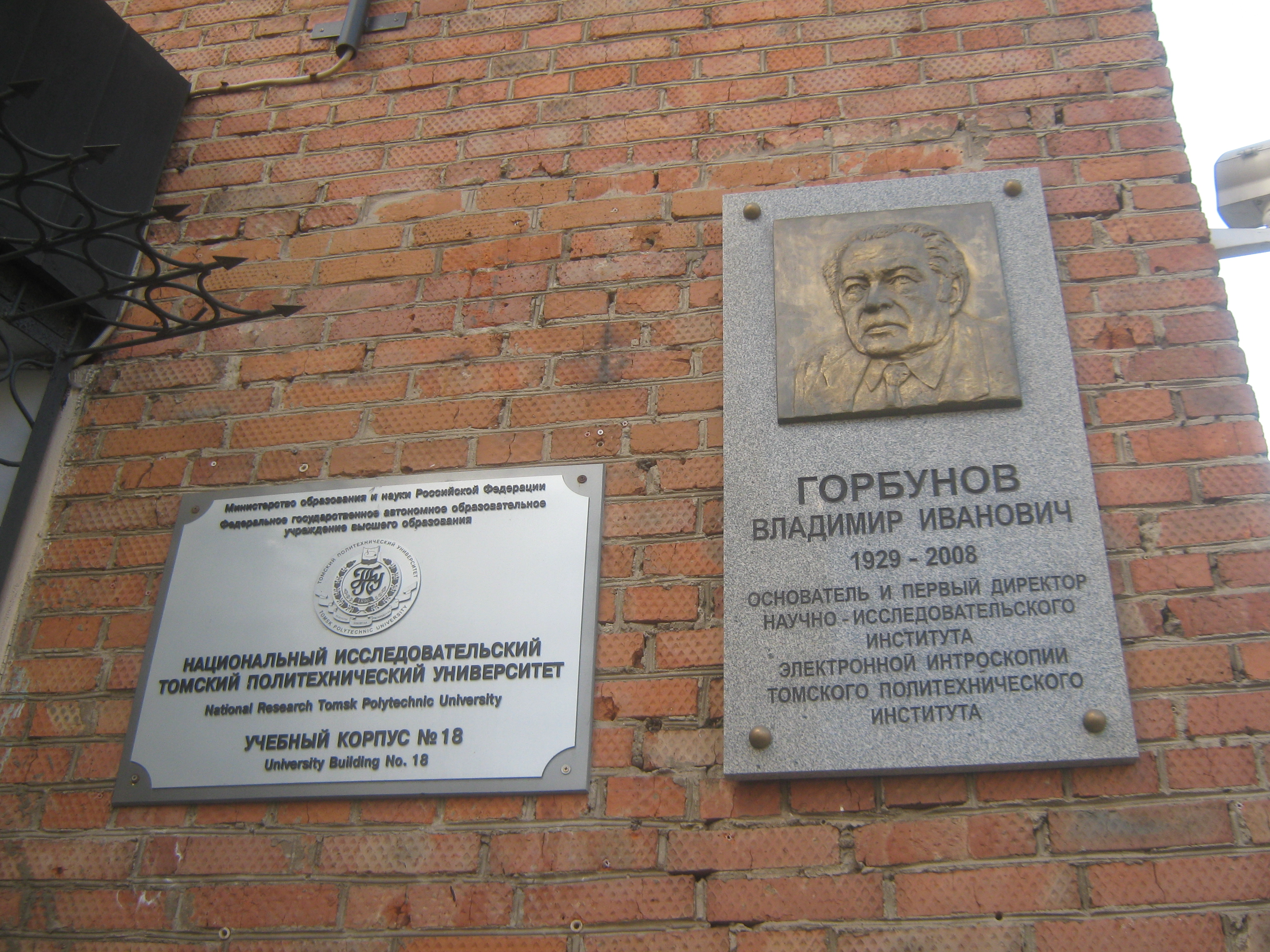 Савиных 7, Томск